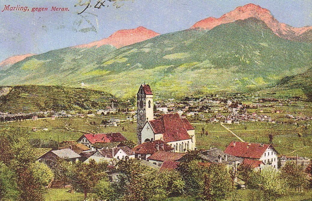 Marlengo